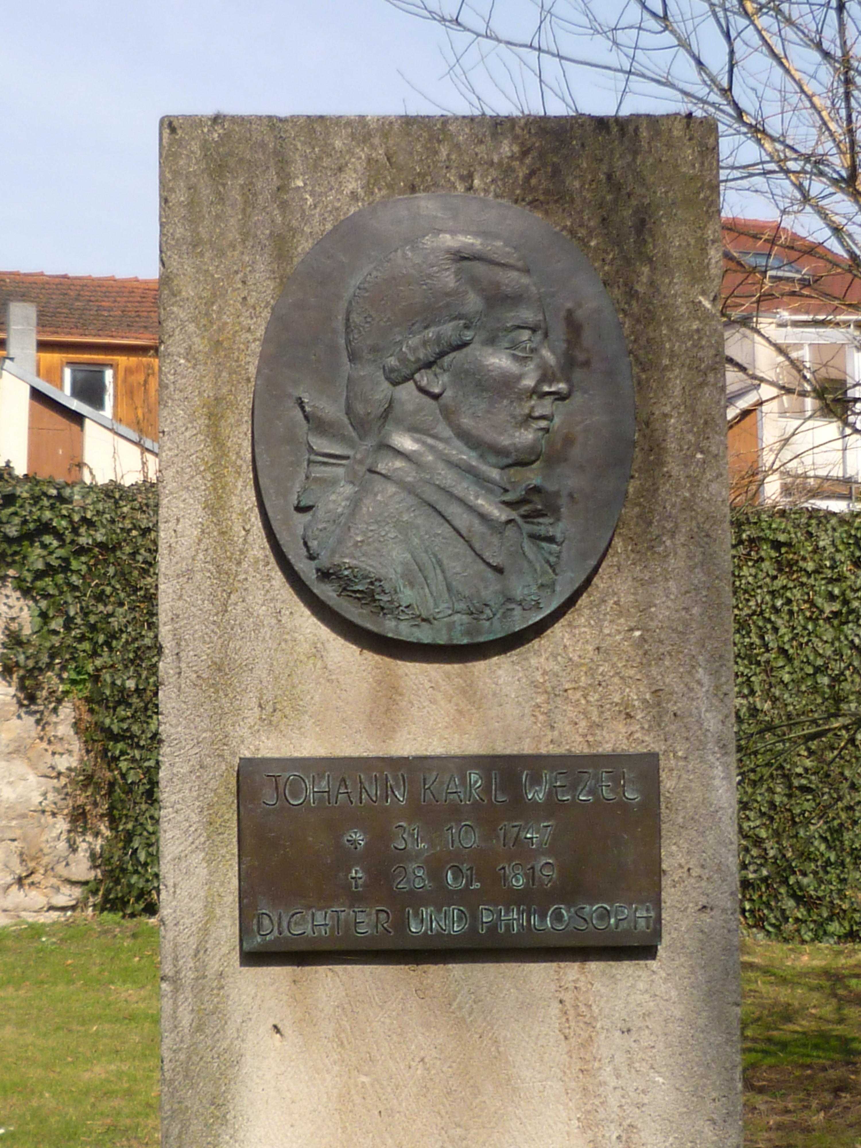 Johann-Karl-Wezel-Denkmal auf dem Gottesacker in Sondershausen/Thüringen